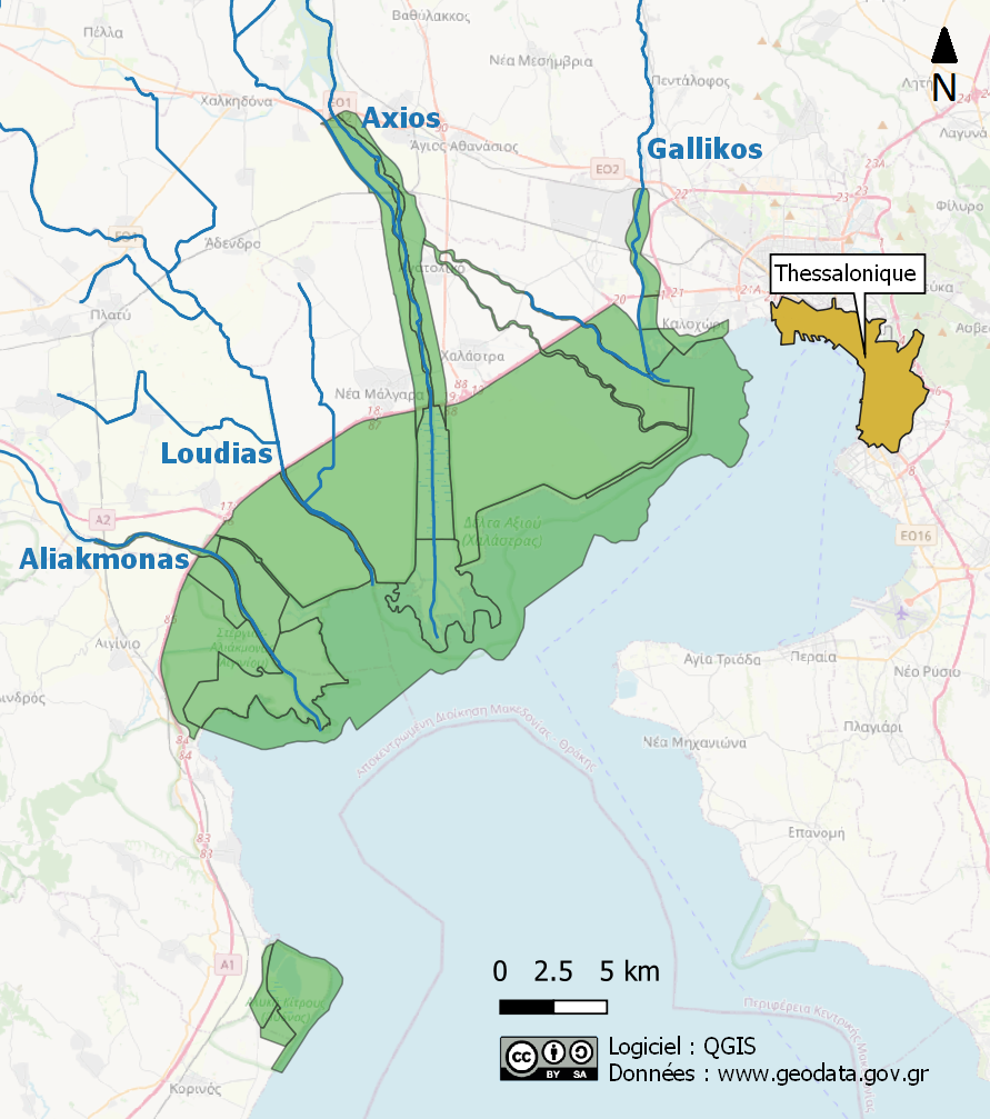 Carte de l'emprise du parc national d’Axios-Loudias-Aliakmonas en Grèce (en vert) et des principaux fleuves se jetant dans le golfe Thermaïque au sein du parc. Fond de carte OpenStreetMap. Données 2015 de Management Body of Axios - Loudias - Aliakmonas Delta mises en opendata sur le site (CC BY v.3.0 cf. Logiciel libre QGIS. Réalisation : Iolchos07.